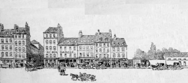 Kaufhaus Bon Marché in Paris, 1863. Fassade an der Rue de Sèvres, links Einmündung der Rue du Bac.